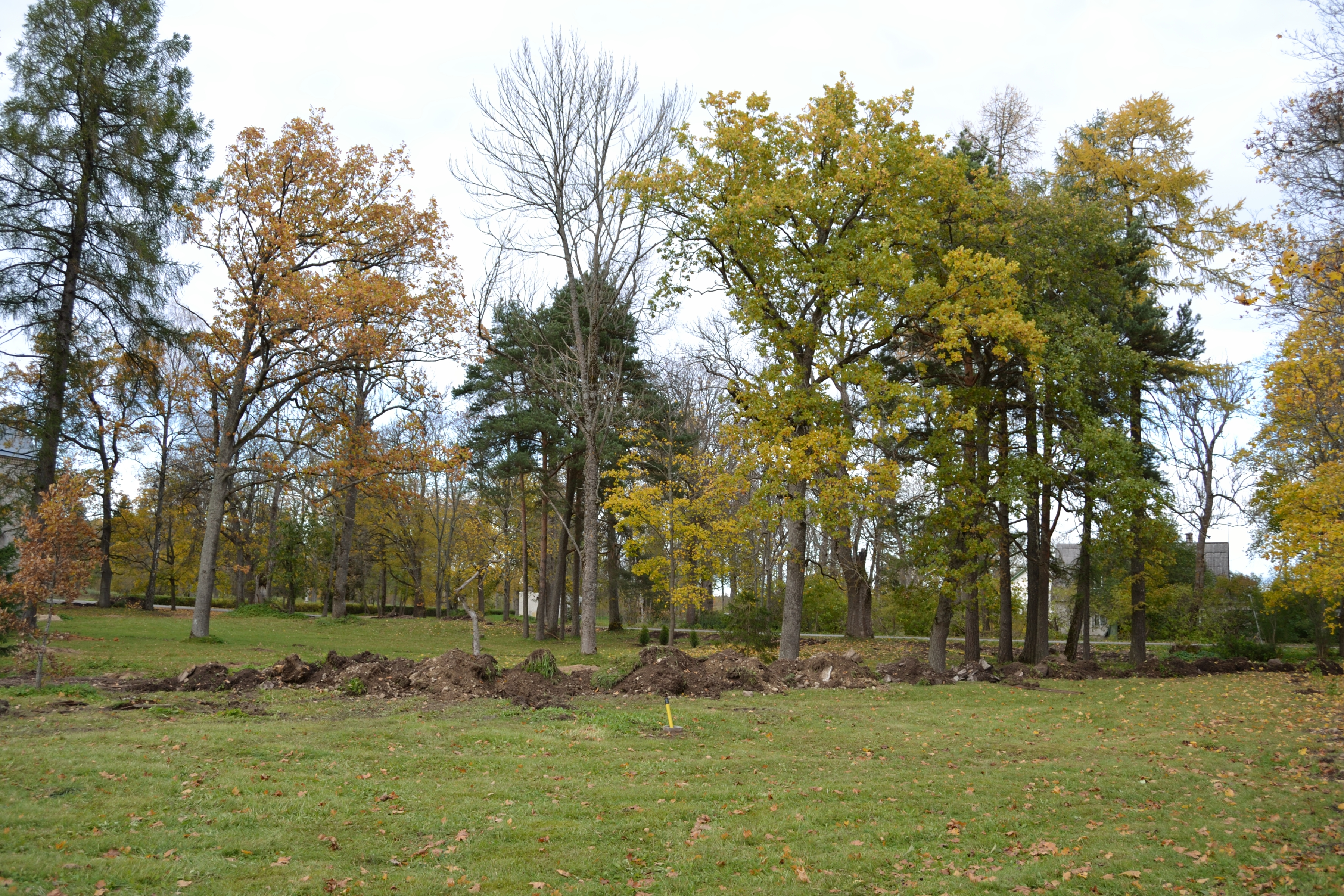 Laitse mõisa park, 19.sajand